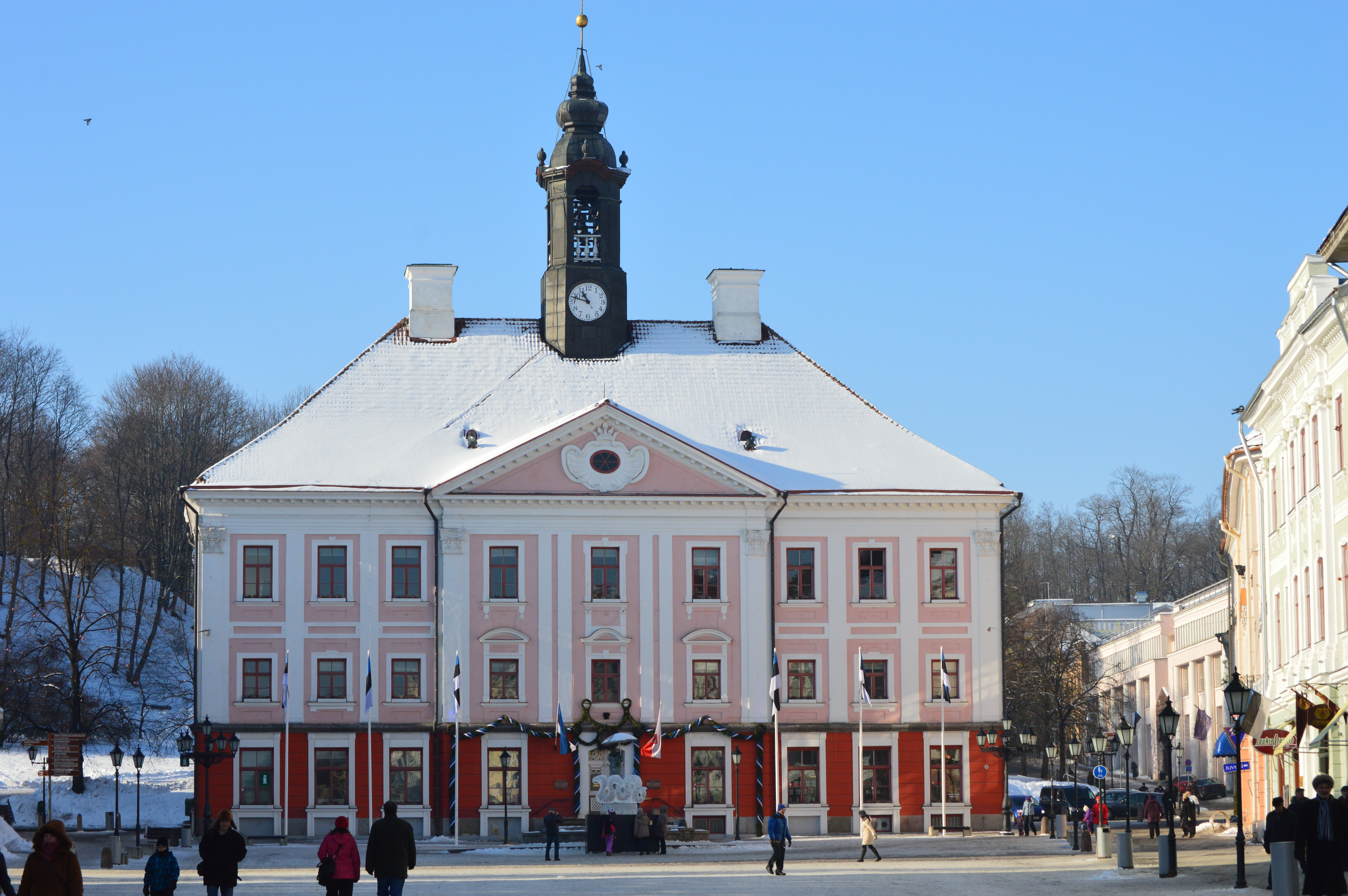 Tartu raekoda Vabariigi aastapäeval